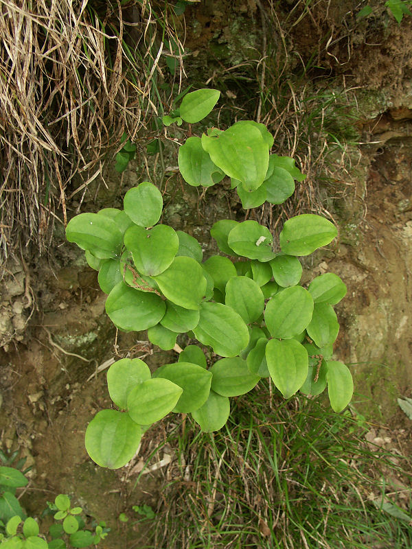 崖からぶら下がって葉を広げている様子。